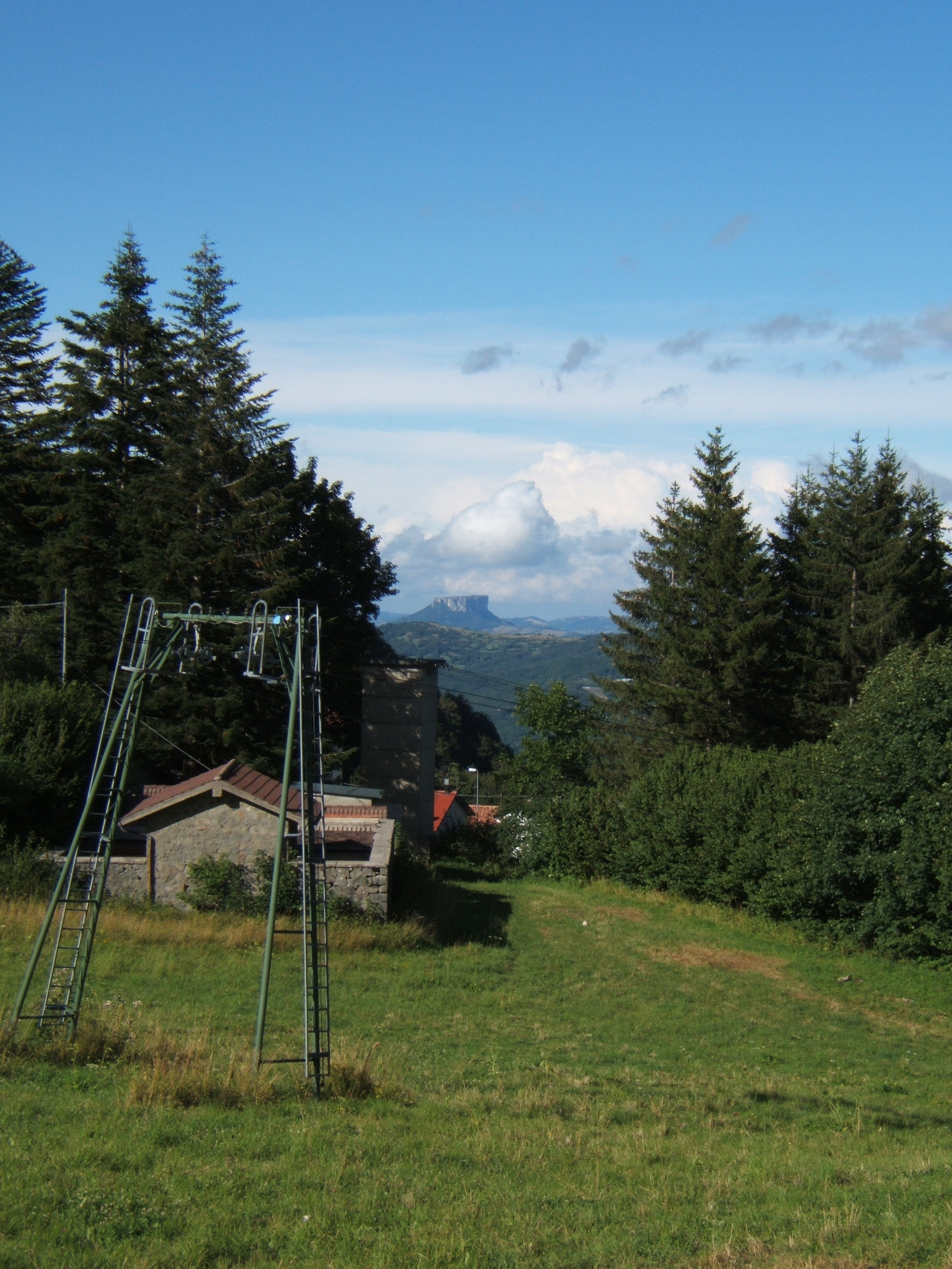 L'Appennino reggiano, dominato dall Pietra di Bismantova, visto da Ospitaletto.